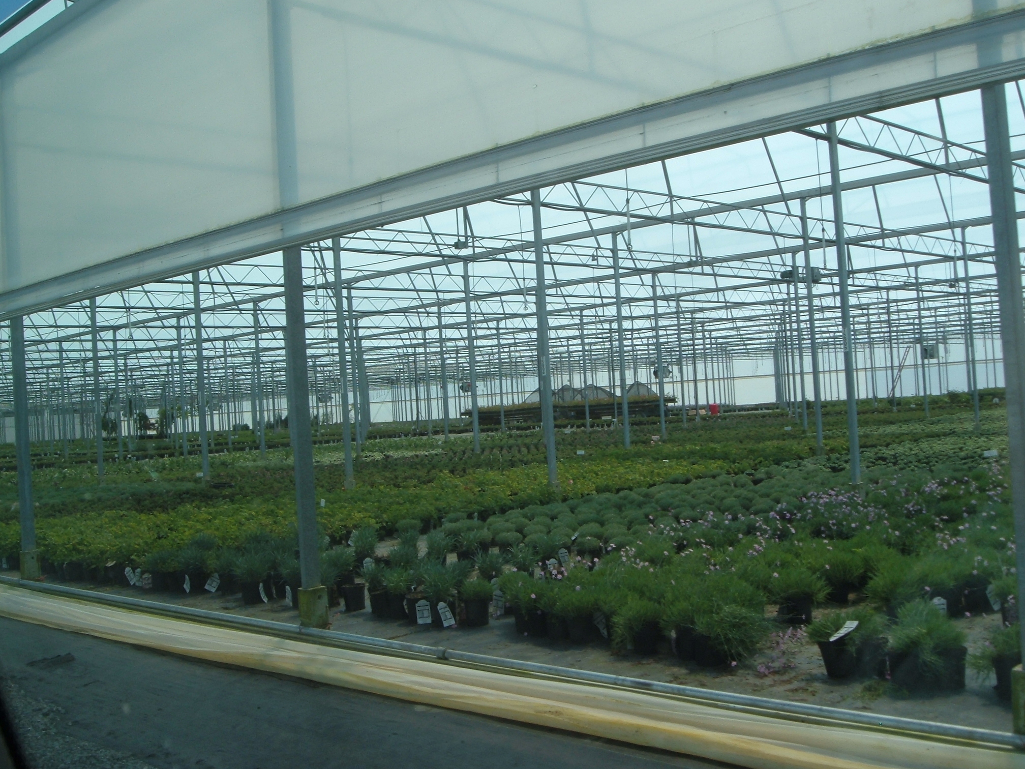 Source: Max Wahrhaftig